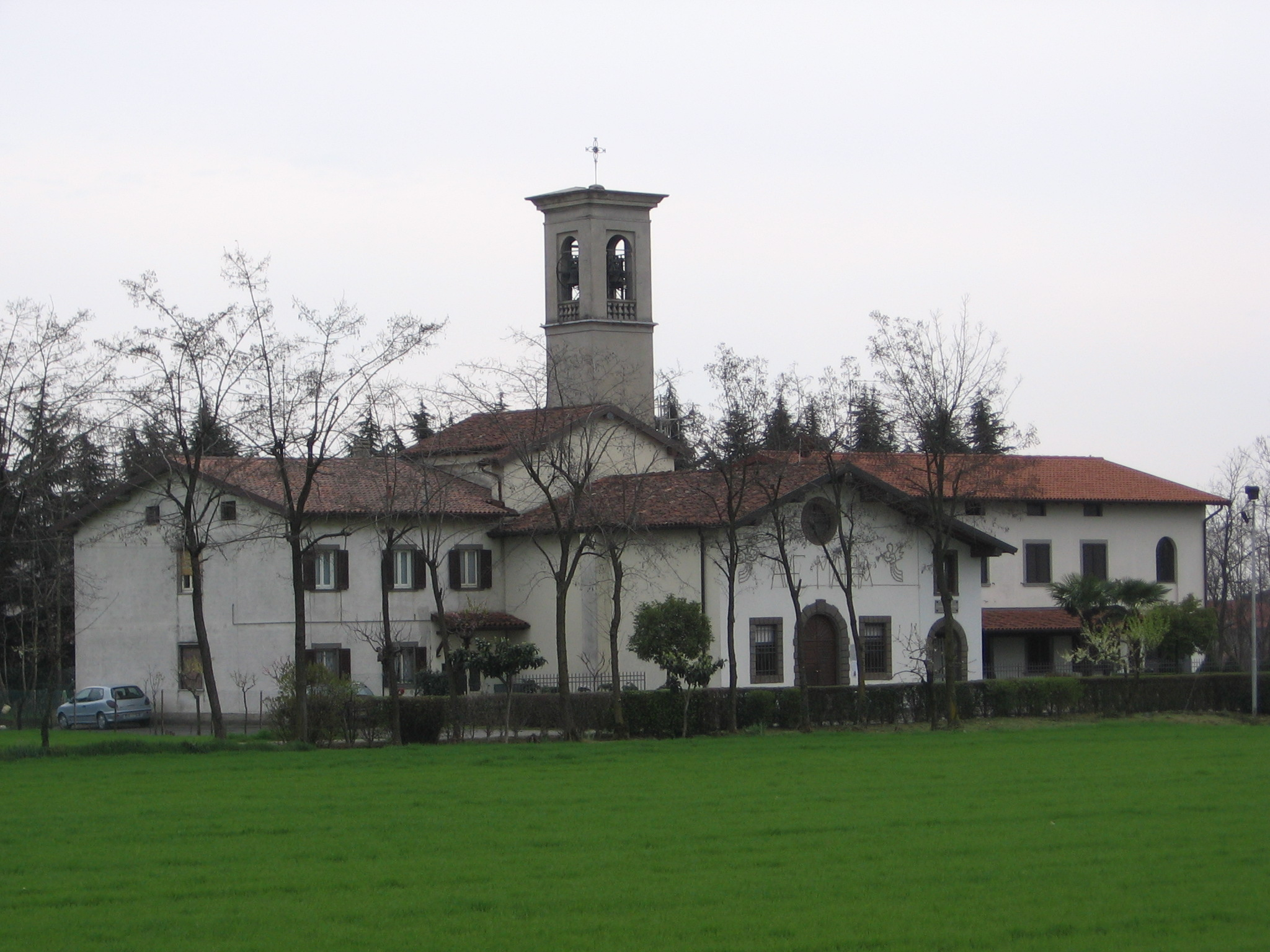 Bolgare, Bergamo, Italia